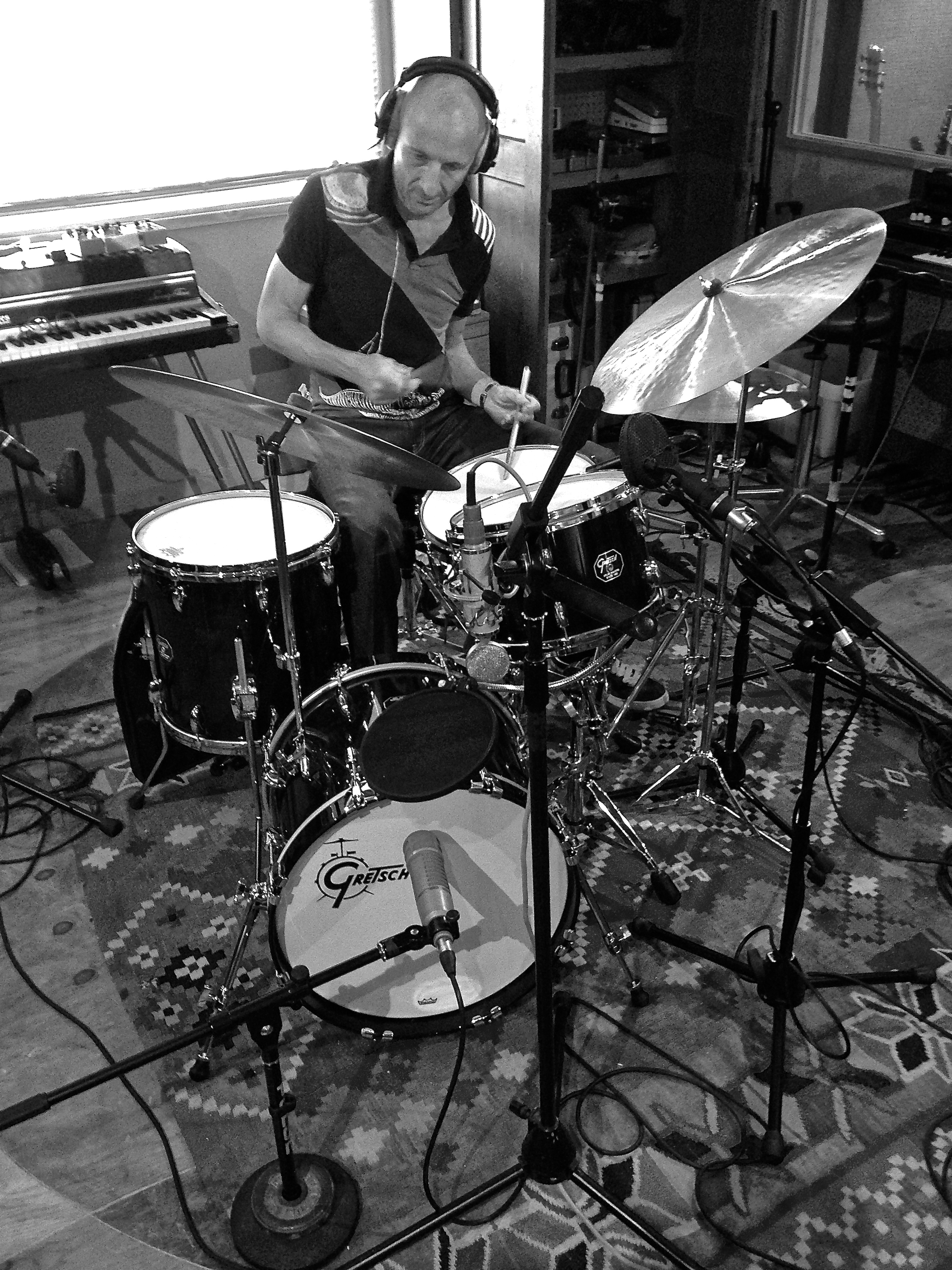 Clive Deamer. Freelance Session Drummer. J&J Studio, Bristol